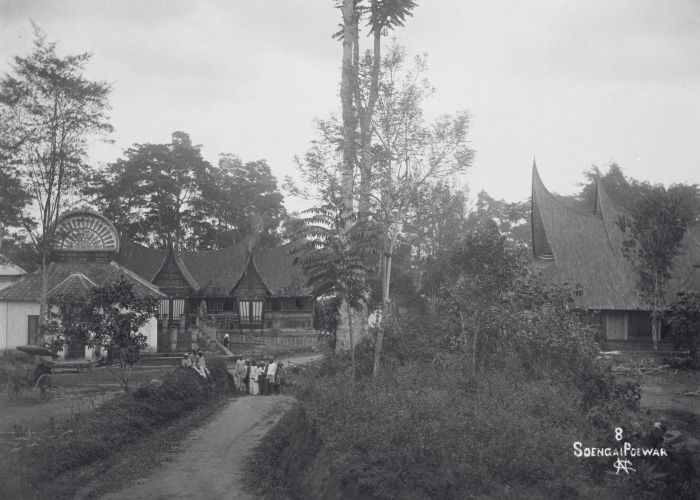 foto. Soengai Poear, Padangse Bovenlanden